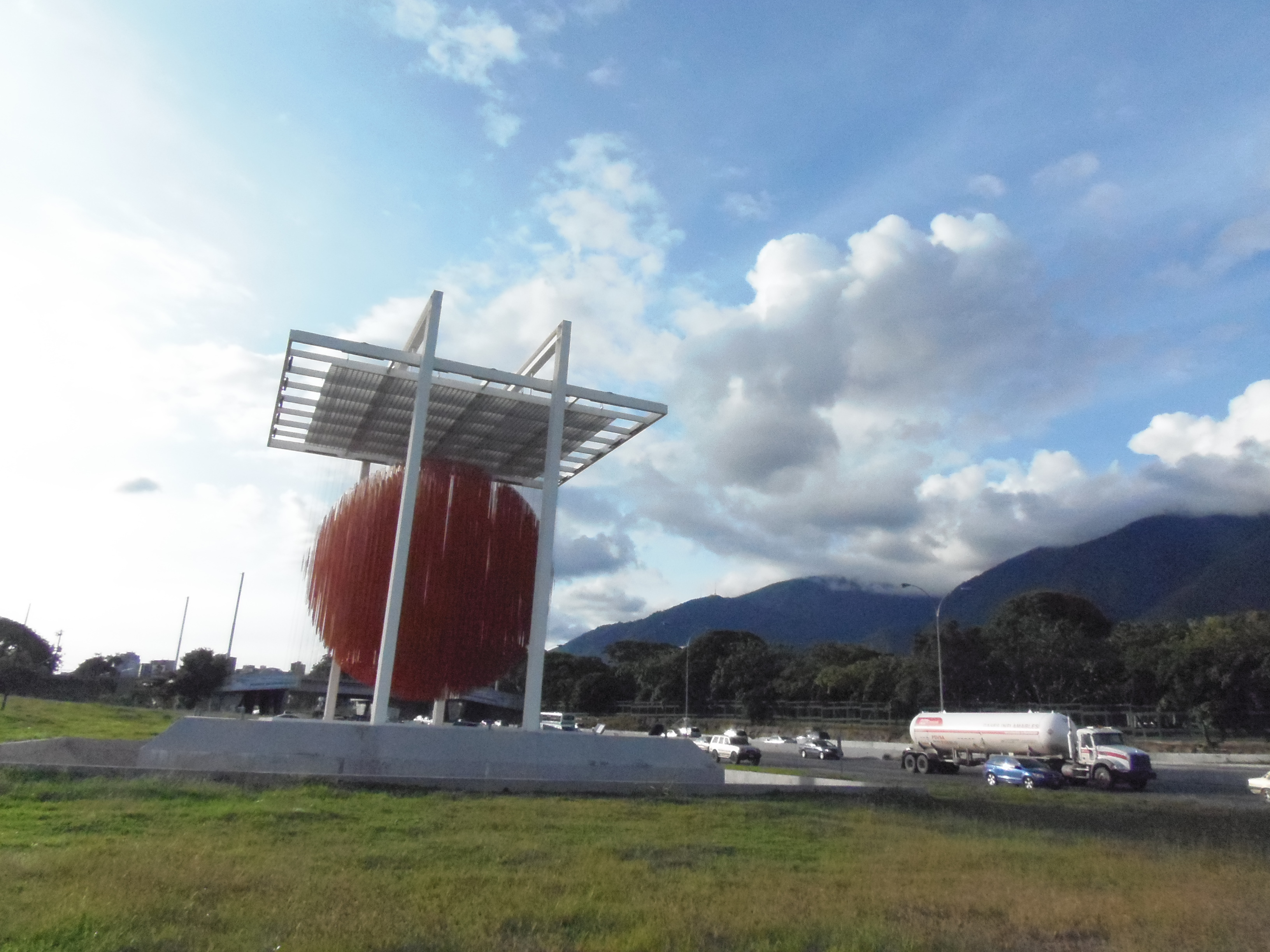 Esfera de Caracas de Jesús Soto en la Autopista Francisco Fajardo